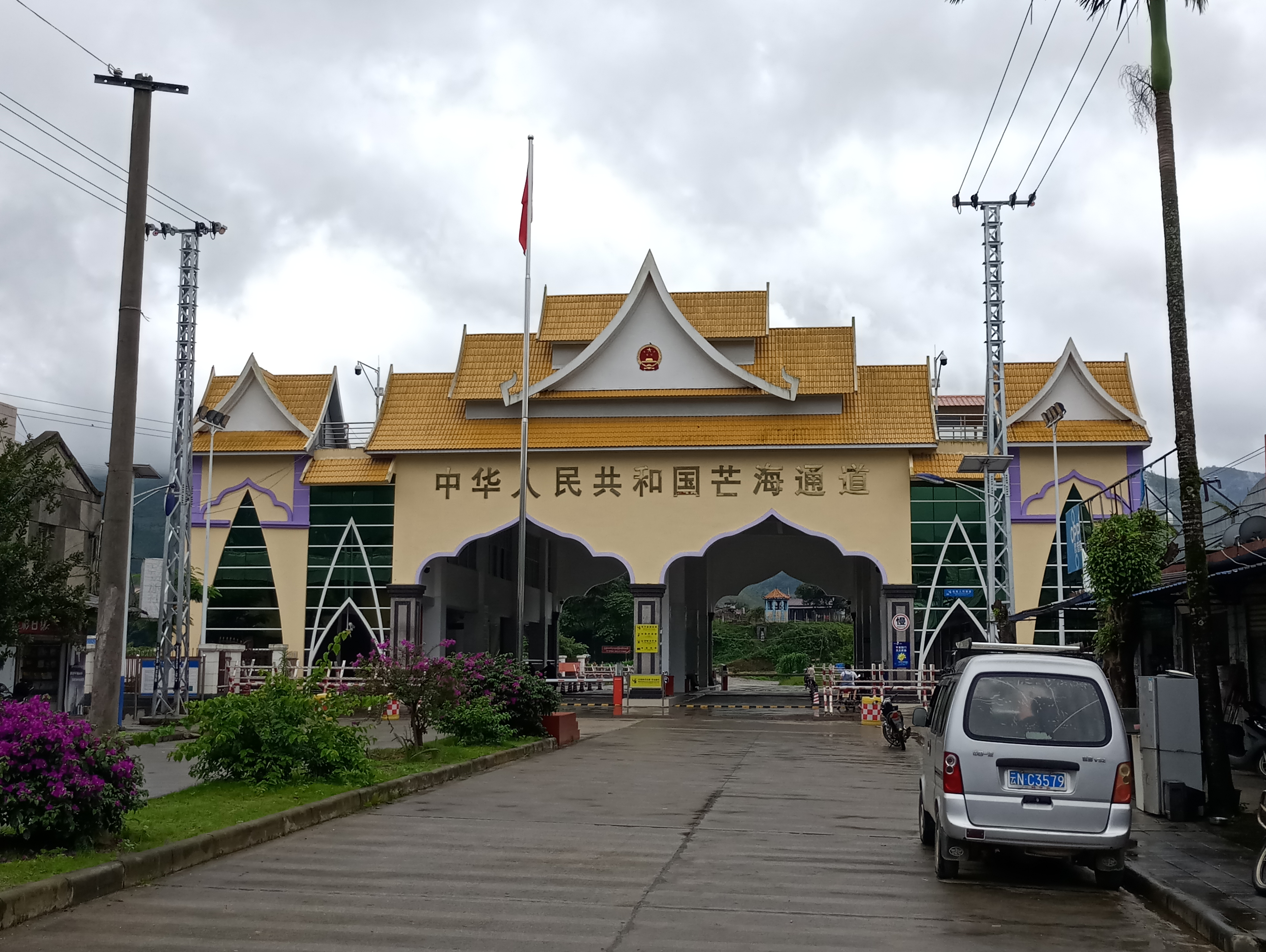 芒海通道联检楼